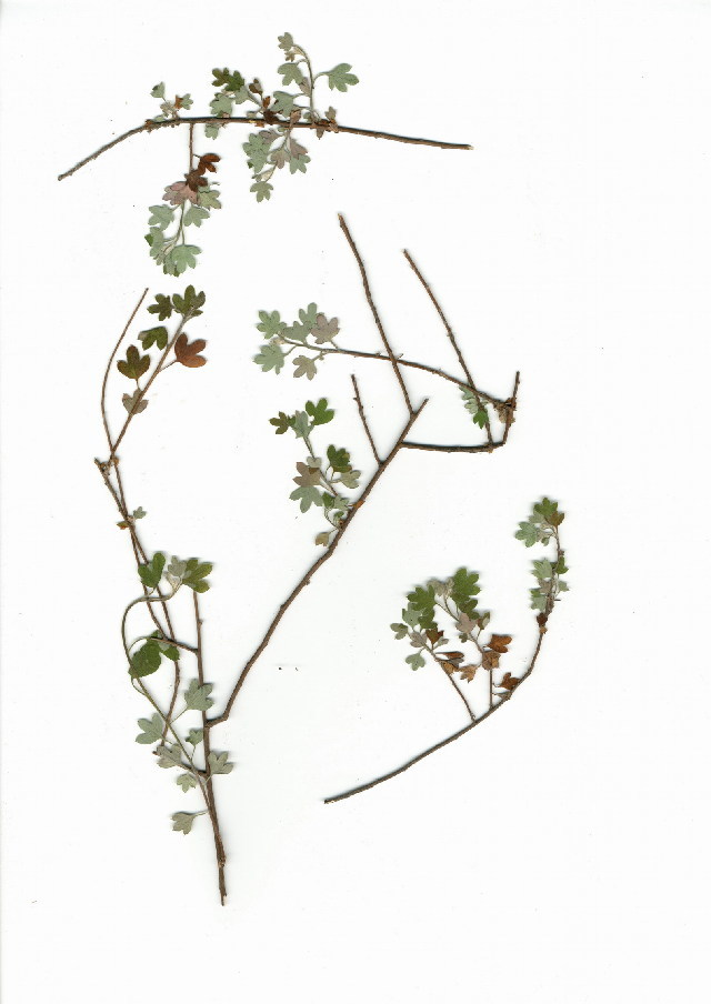 Planta de la familia Asteraceae